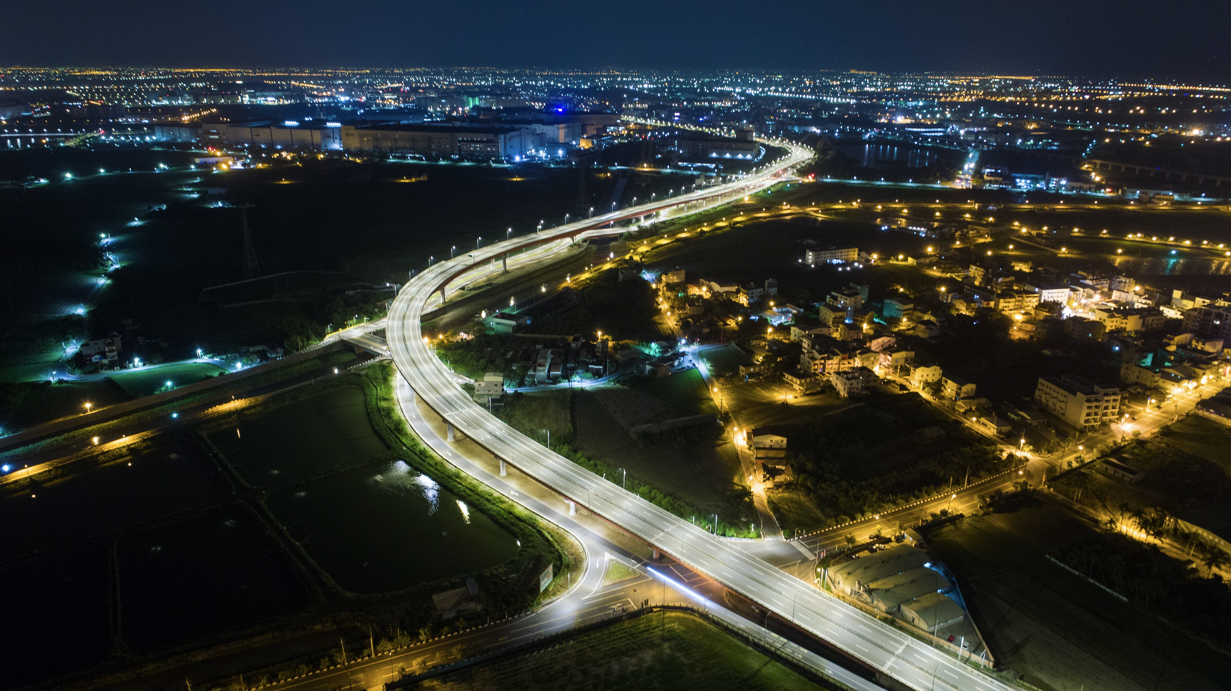 中文（台灣）: 新港社大道空拍實景